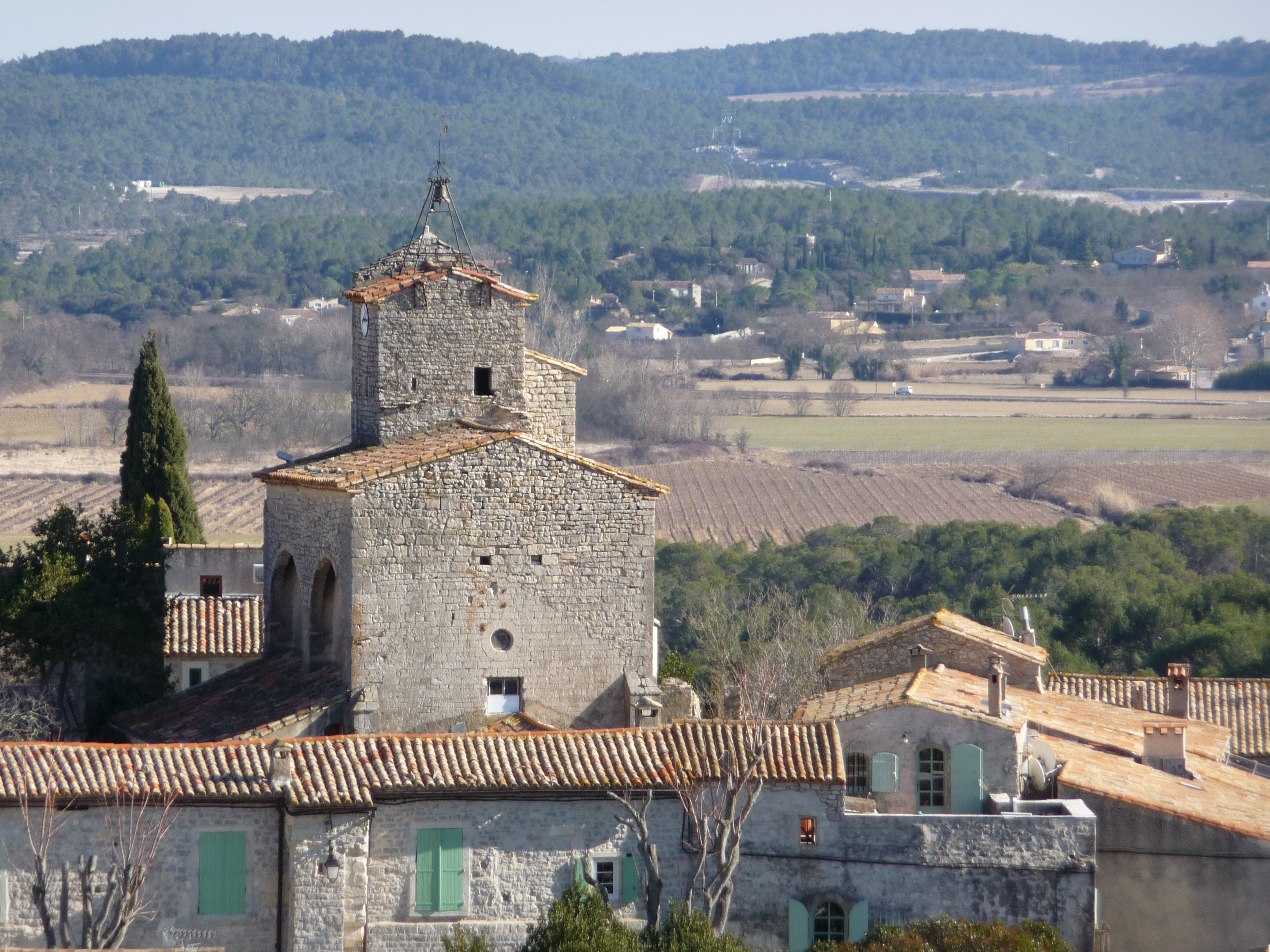 Església de la Nativitat de Sant Joan Baptista de Sant Joan de Cuculas .